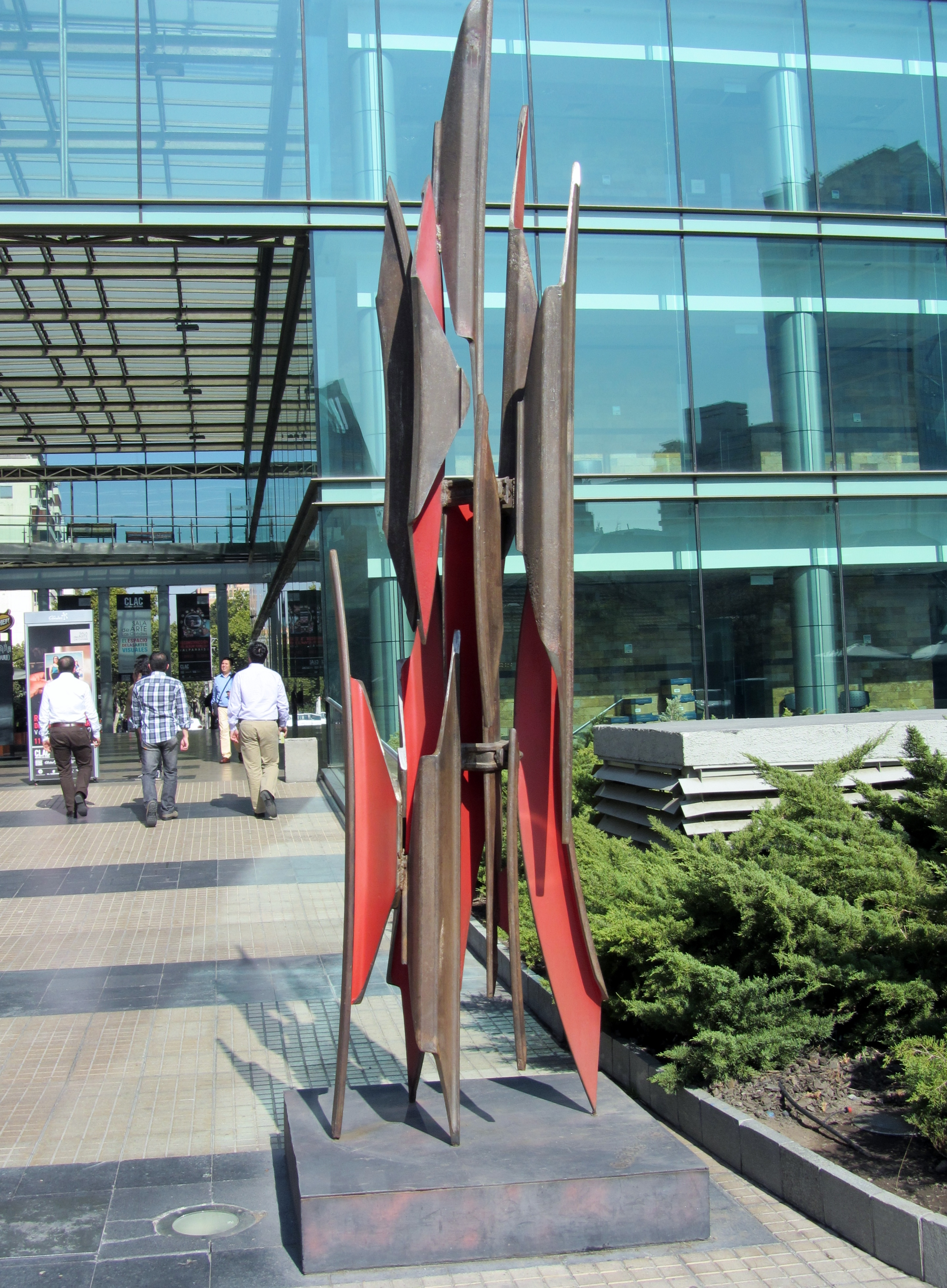 La catedral (2010), obra de Sergio Castillo en el Paseo de las Esculturas La Pastora